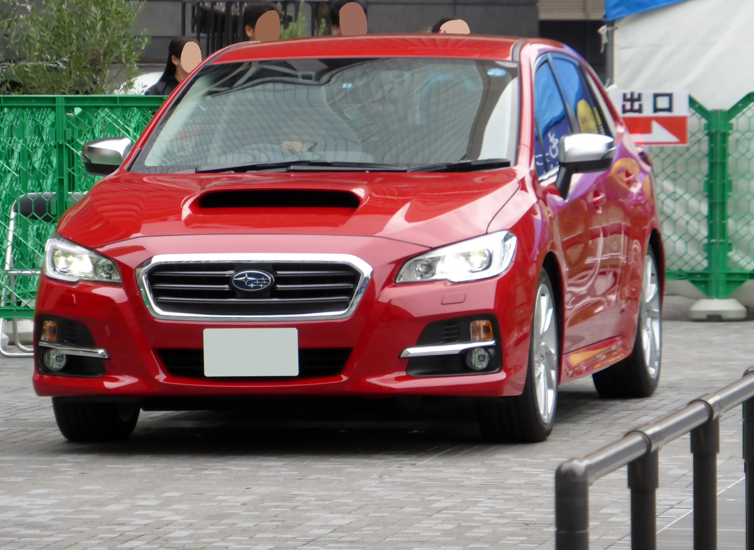 VMG型スバル・レヴォーグ2.0GTアイサイトをフロントから撮影。